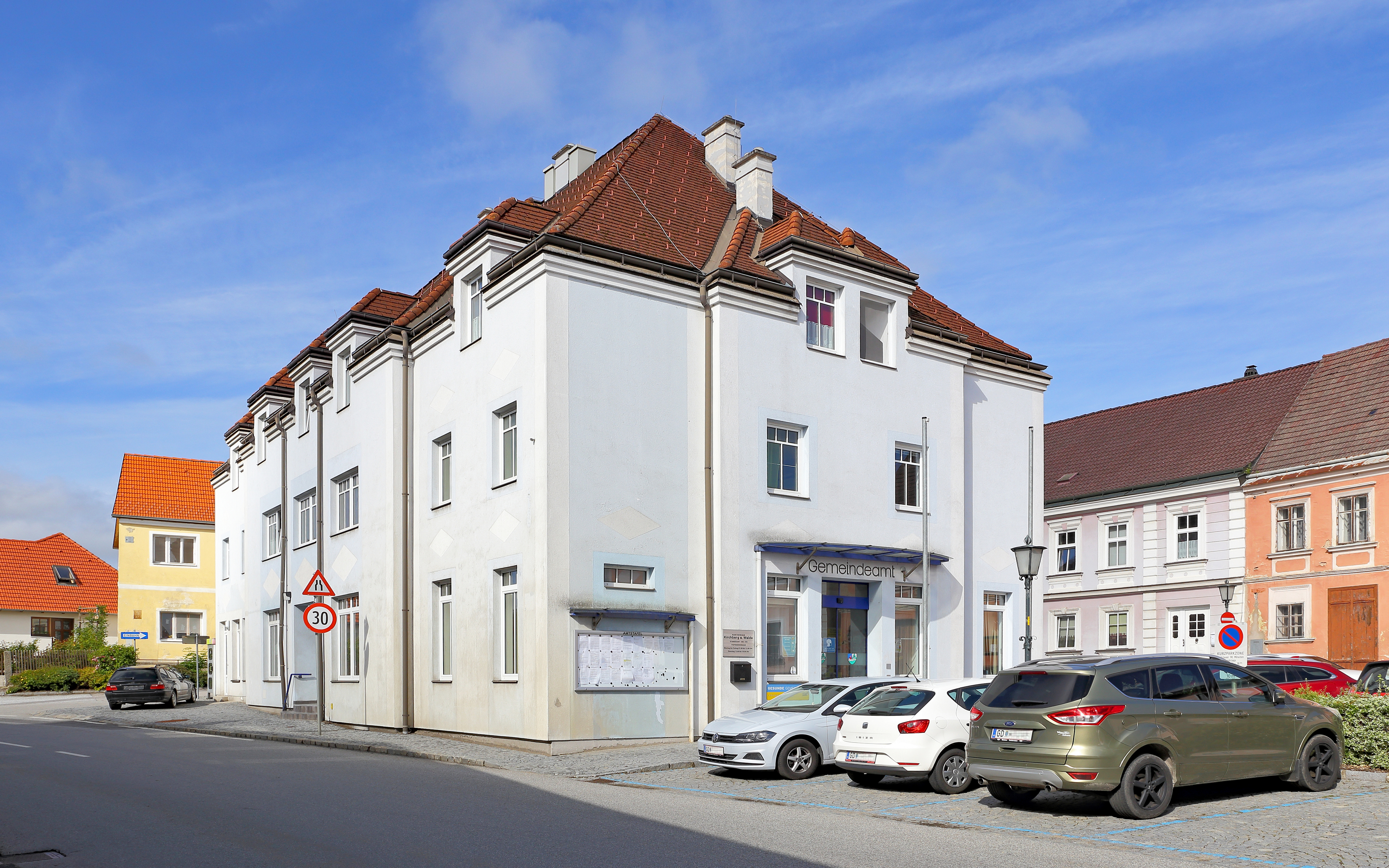 Gemeindeamt in Kirchberg am Walde, Bezirk Gmünd